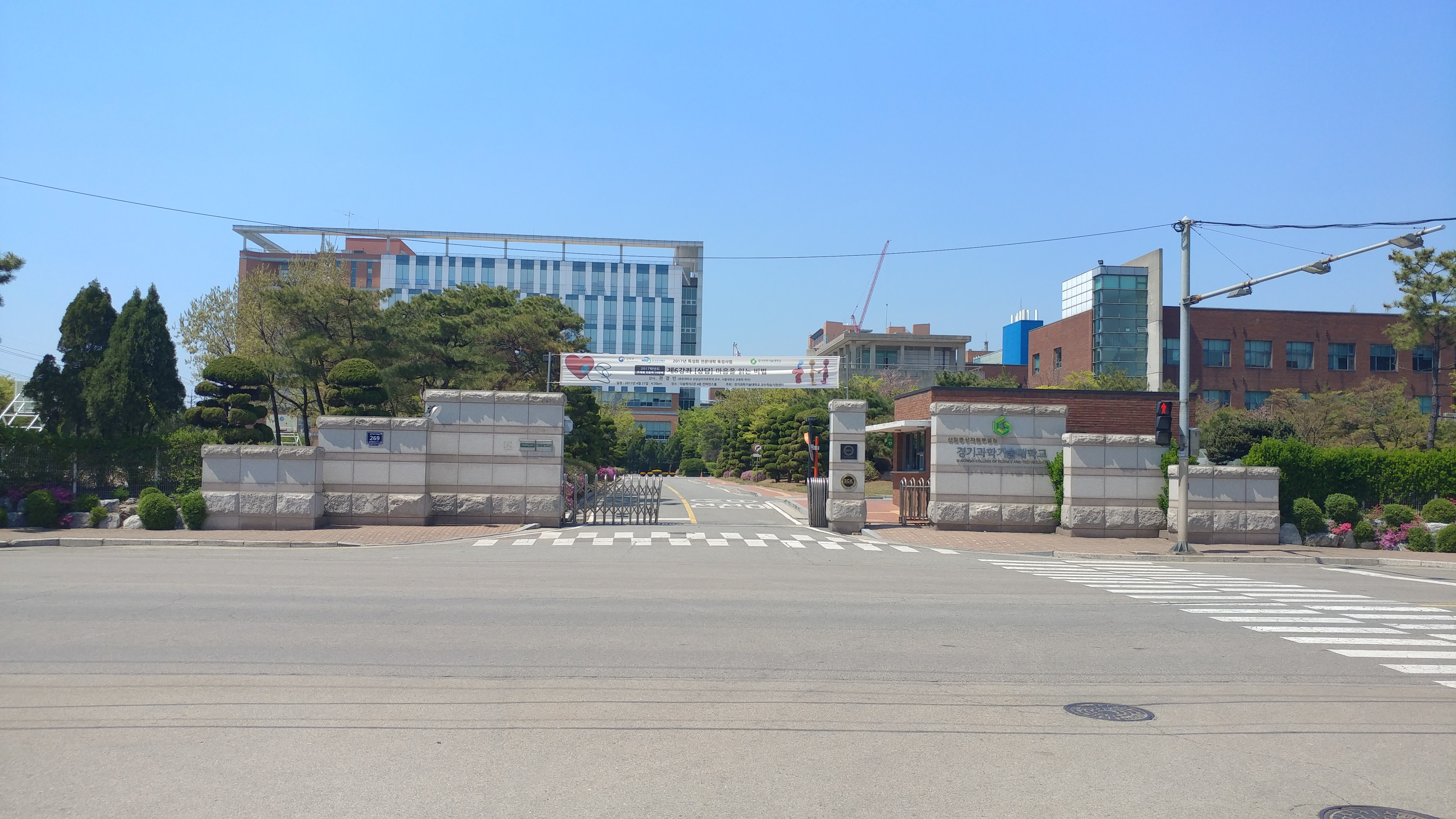 경기과학기술대학교 제1캠퍼스 입구